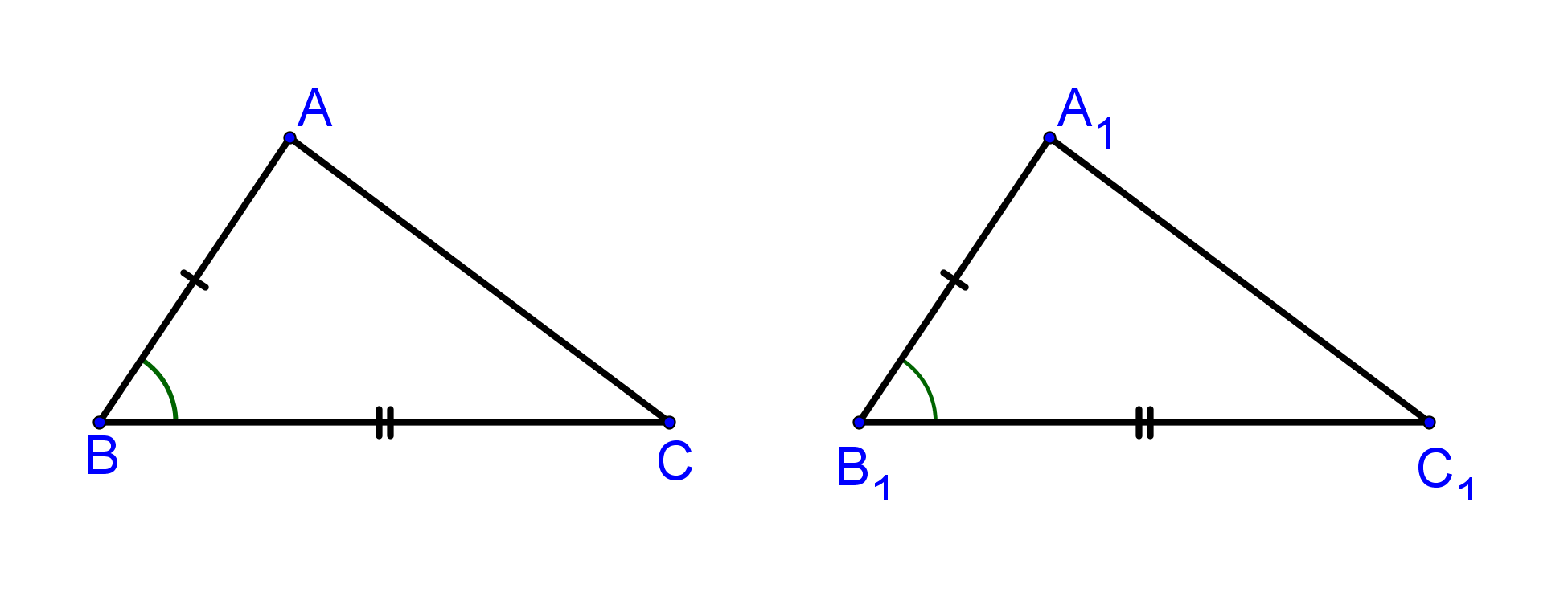 скриншот свободно распространяемой среды GeoGebra